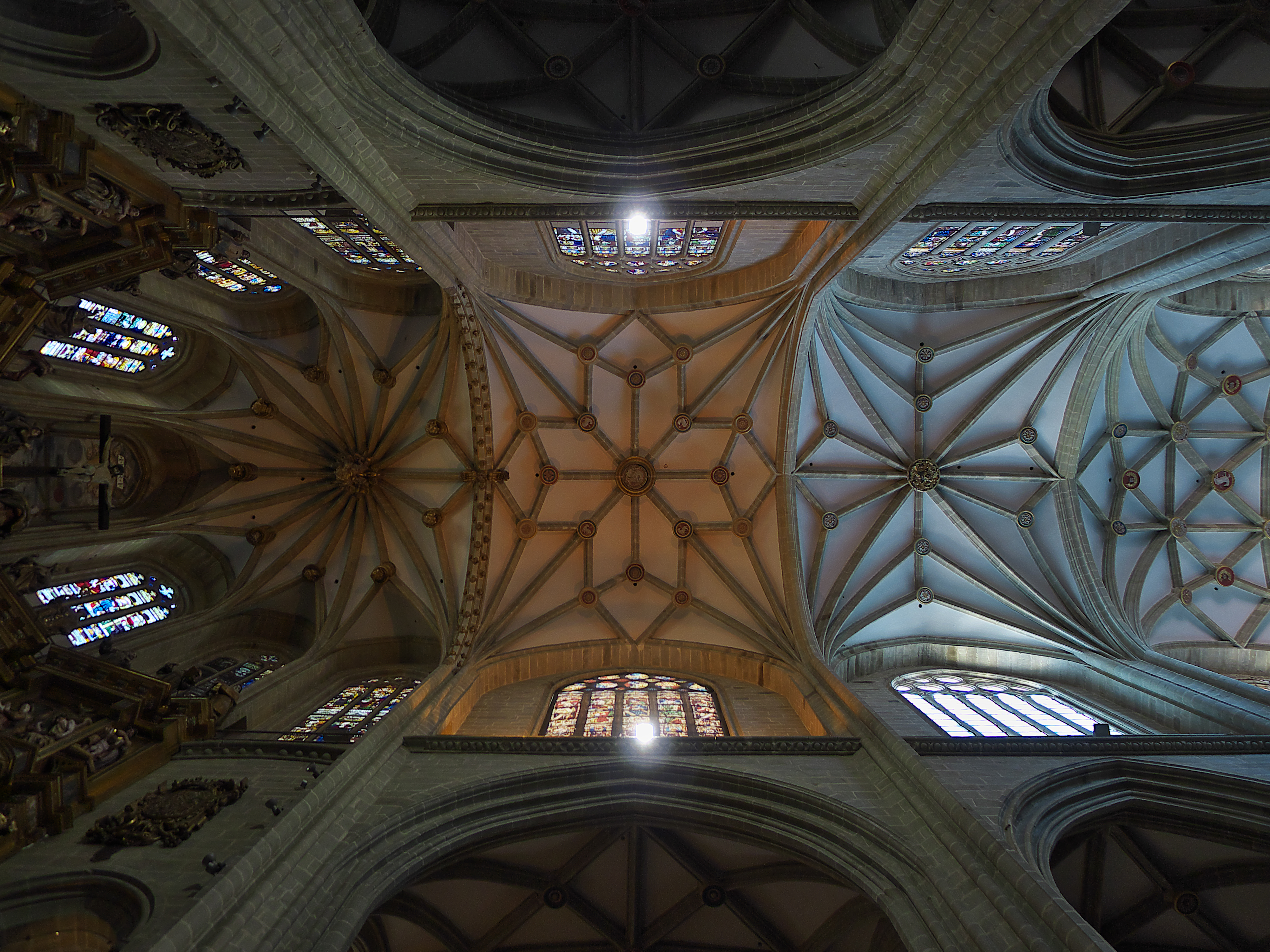 La Catedral de Astorga es un magnífico modelo de la bóveda tardogótica, siendo su maestro mayor, después de 1542, Rodrigo Gil de Hontañón destacado especialista.